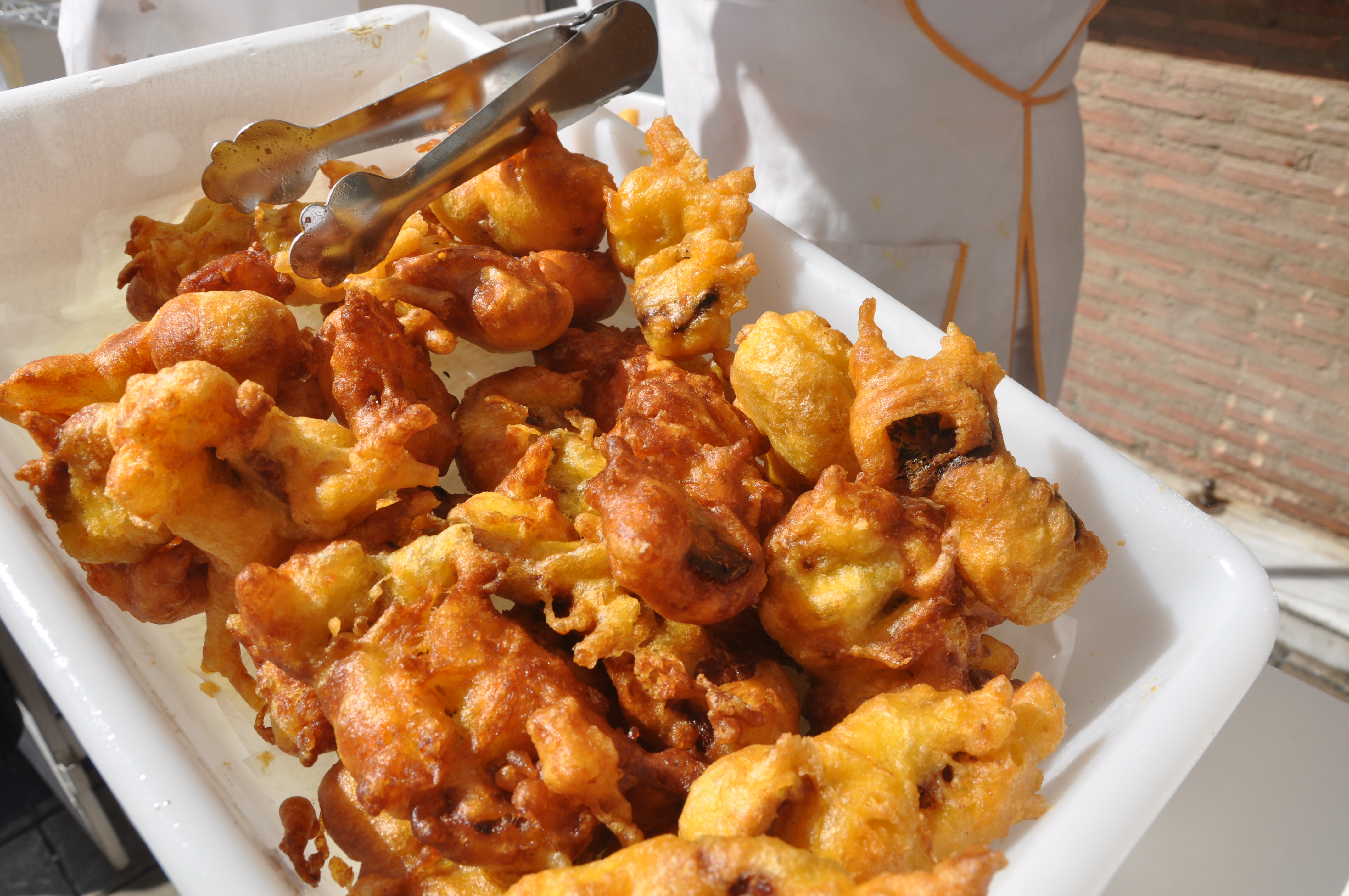 Imatge de figues albardaes, típic de Casinos.Bunyols Bàrbara. Falles 2017 This is a photography of a Folklore festival in Spain (Wikidata id Q1143768).